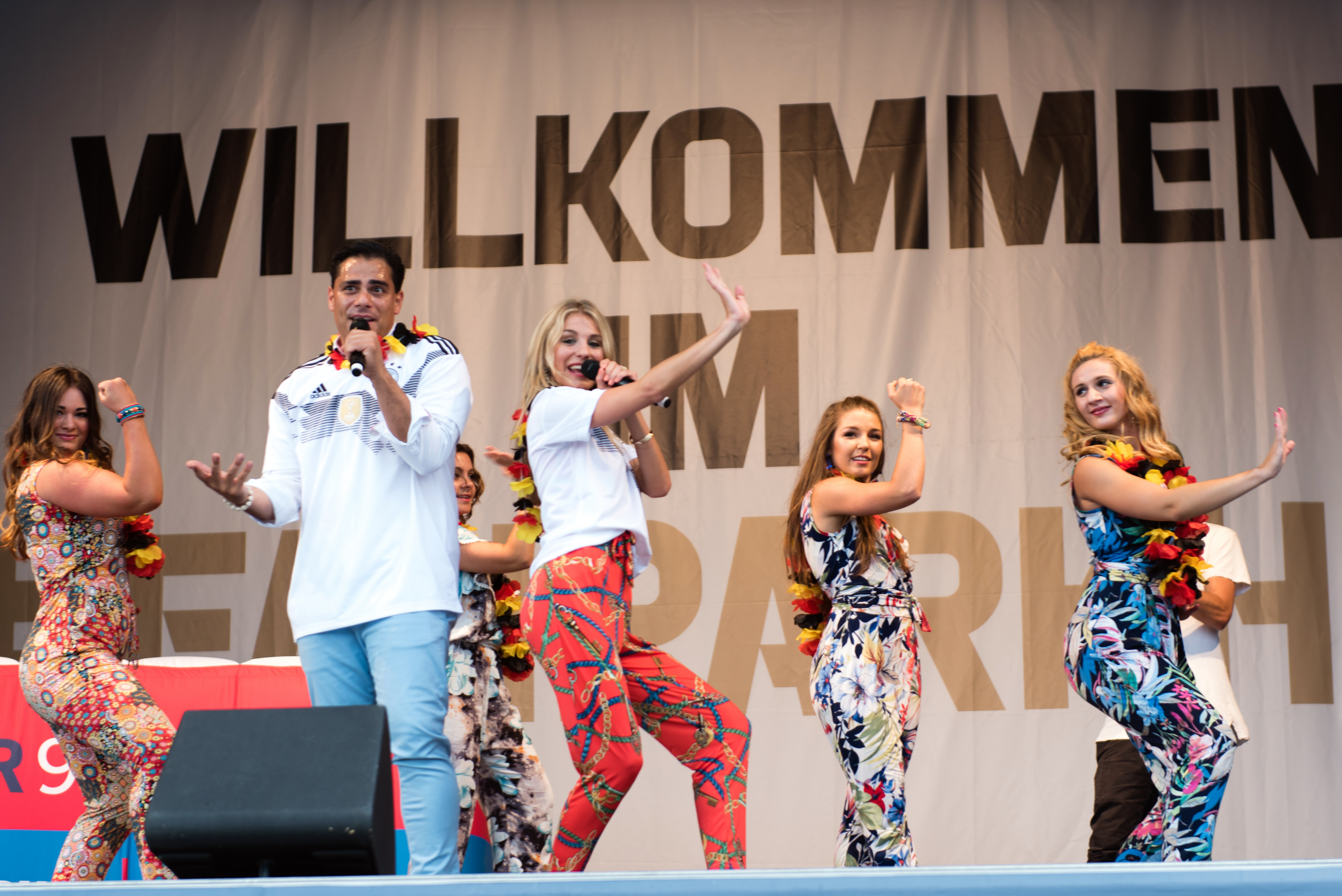 Hot Banditoz beim Fan Park Hamburg 2018